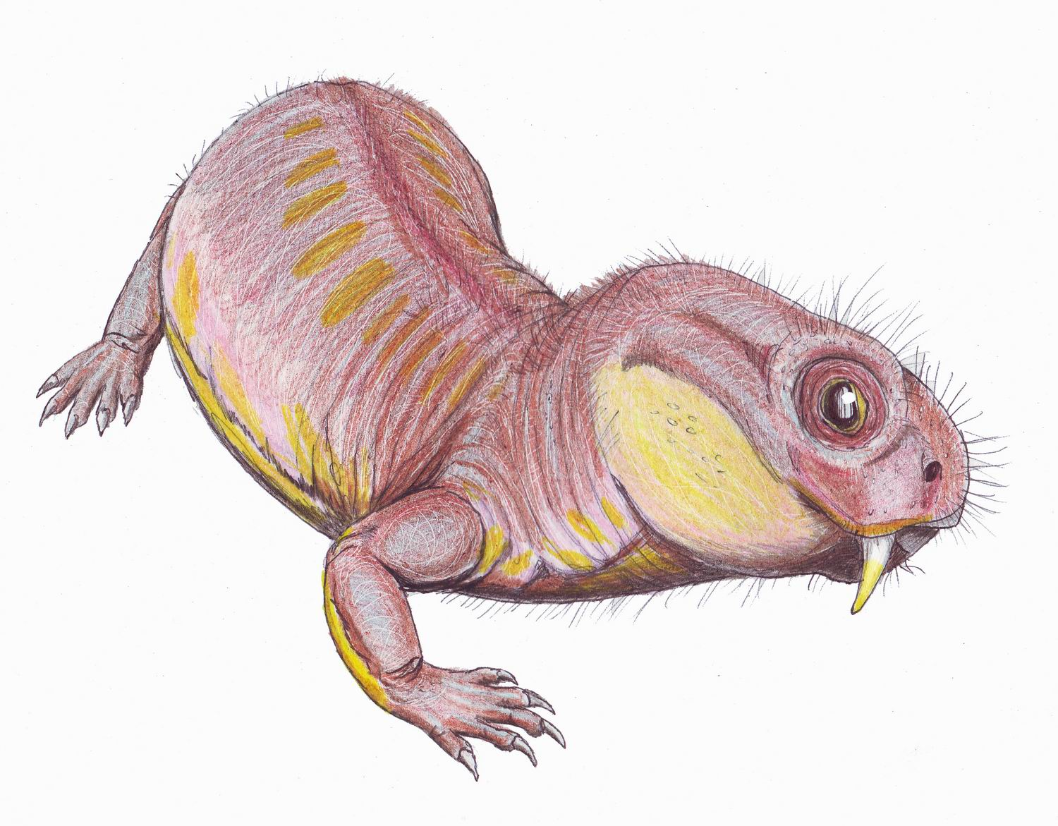 Robertia - a small dicynodont